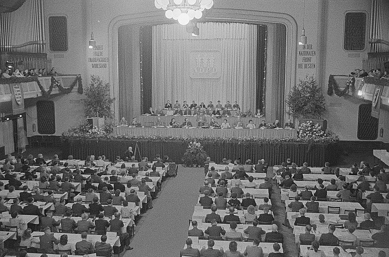 Original image description from the Deutsche Fotothek Blick auf Publikum und Podium beim NDPD-Parteitag 1950